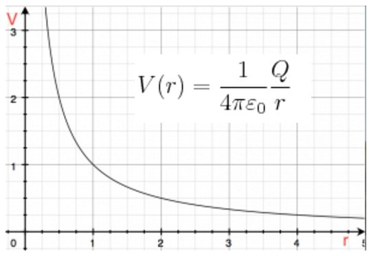 Representación del potencial eléctrico